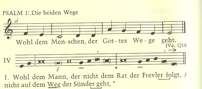 Noten zu Psalm 1 aus dem Gotteslob. Das röm.-kath. Gebet- und Gesangbuch von 1975, das erste gemeinsame für alle deutschsprachigen Bistümer (außer der Schweiz), trägt den Namen "Gotteslob".